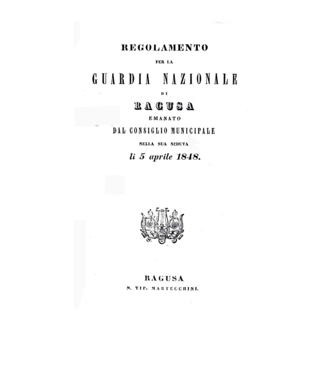 Дело Антуна Казначића Alcune pagine su Ragusa